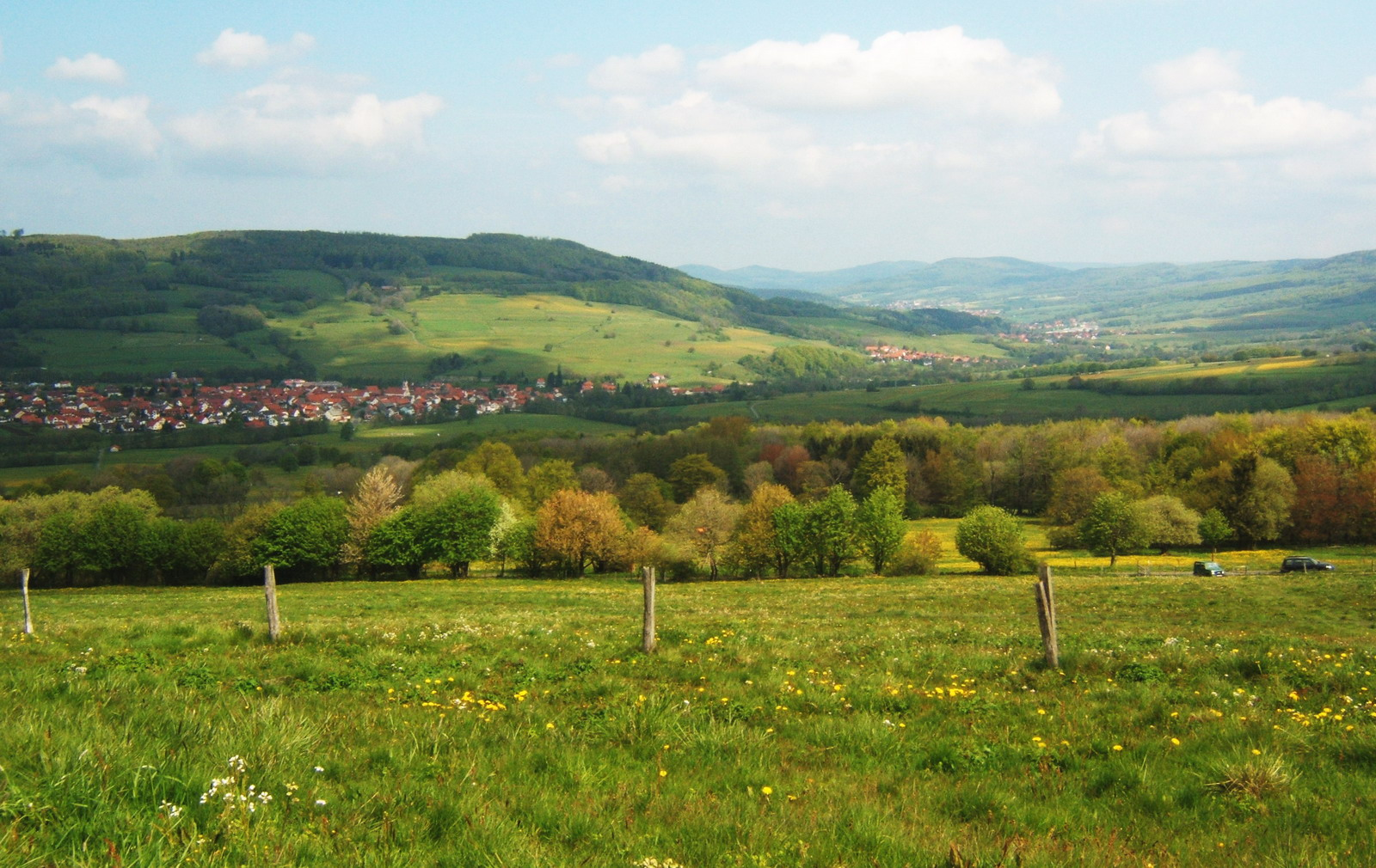 Das Tal der Ulster (Fluss) bei Wüstensachsen (Hessische Rhön)